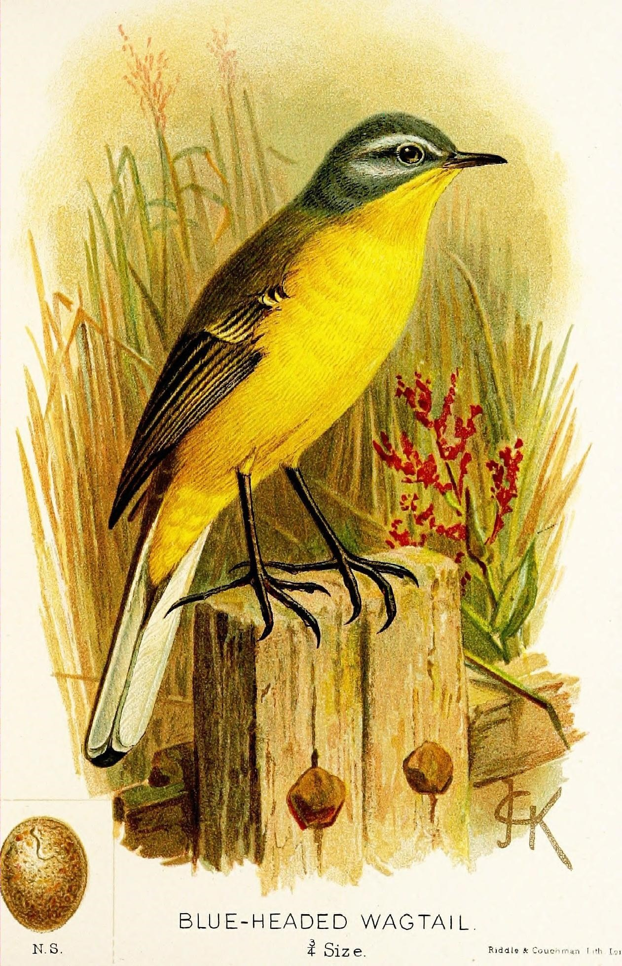 N.S, BLUE-HEADED WAGTAIL, i Size.